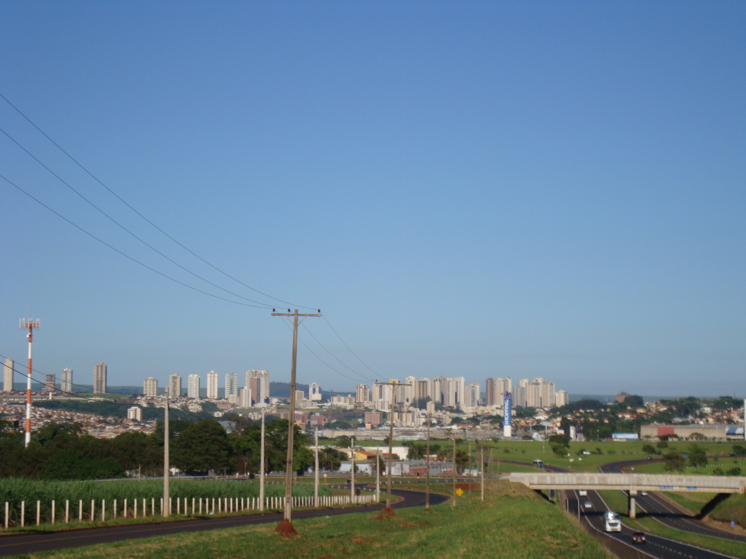 Rodovia Abrão Assed - SP 333